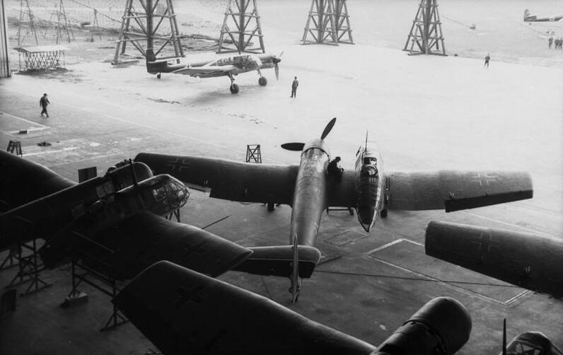 Aufklärungsflugzeuge Blohm + Voss BV 141